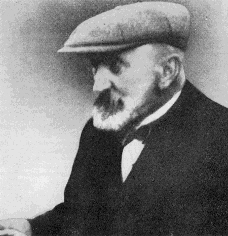 Johannes Gillhoff (1861-1930), niederdeutscher Schriftsteller.